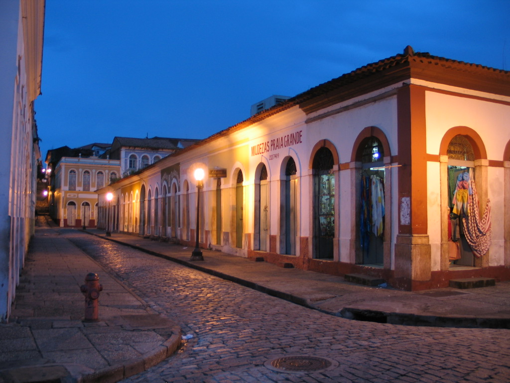 Rua Portugal, mercado central, bairro Praia Grande, São Luis do Maranhão